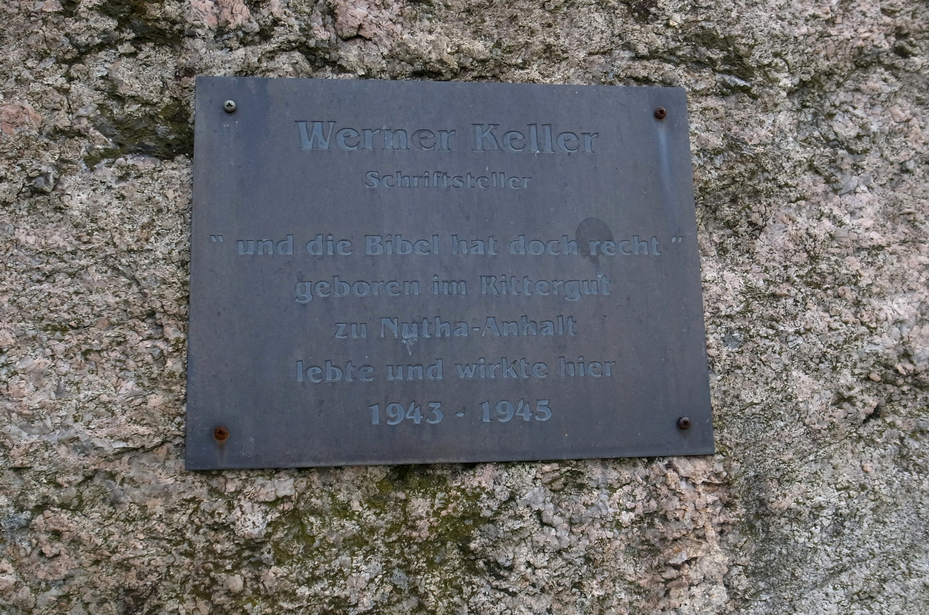 Gedenktafel für Werner Keller (Schriftsteller *1909 ; †1980) in Tochheim (Stadt Zerbst/Anhalt, Ortsteil von Hohenlepte).